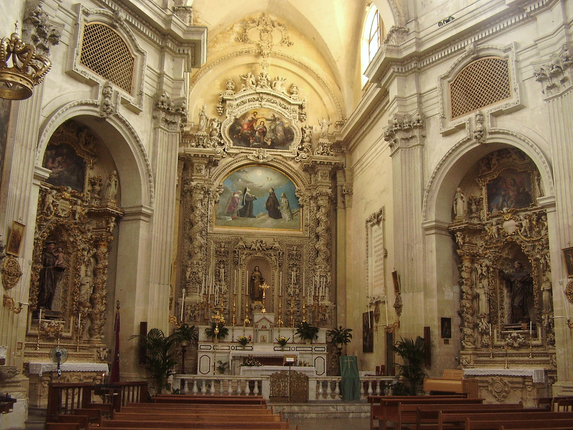 Interno chiesa di santa Chiara Lecce